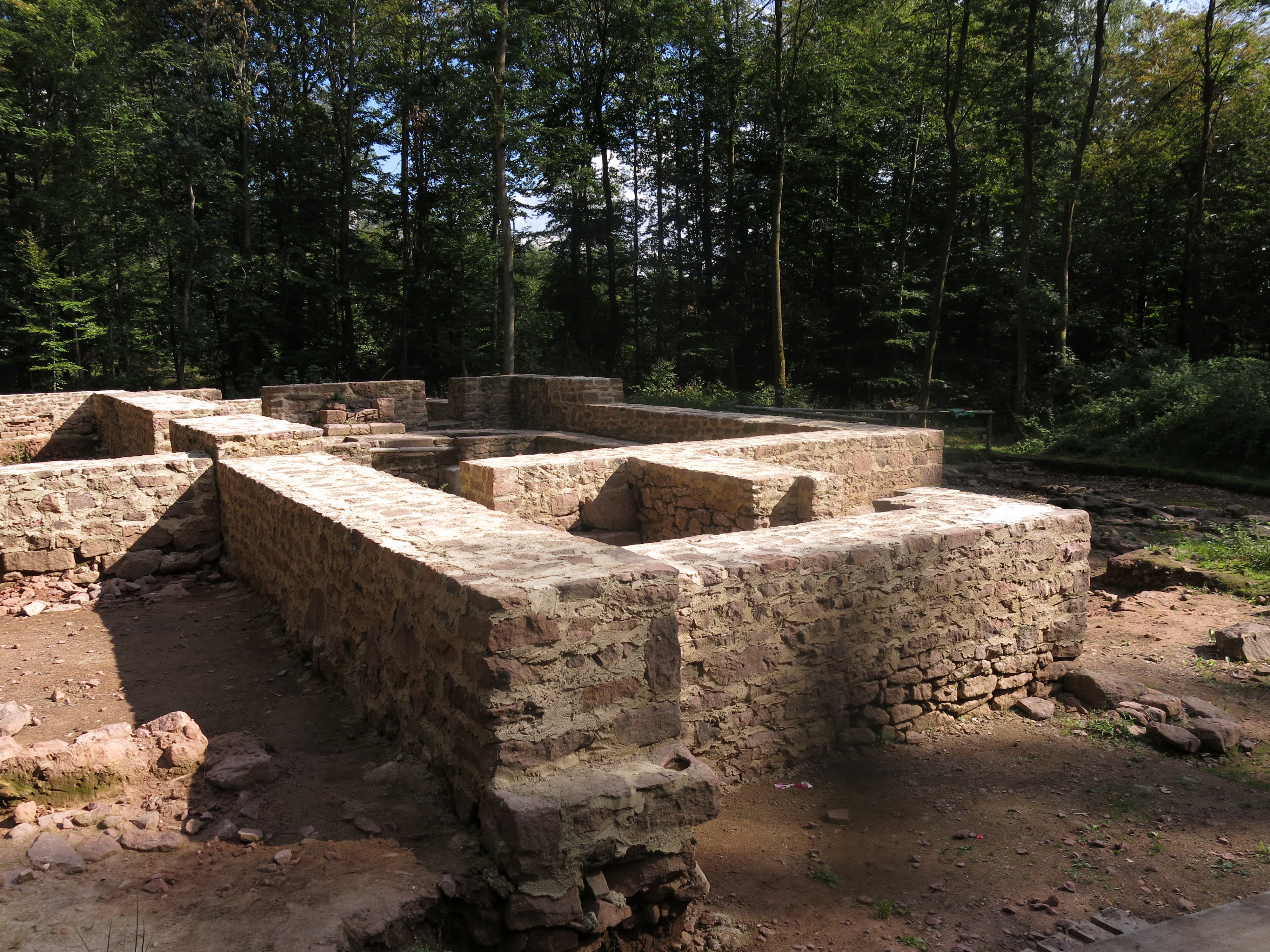 Kloster Einsiedel (Elisabethenzell) an der Birkenhainer Landstraße - Ausgrabungen und Rekonstruktionen, Stand Oktober 2016